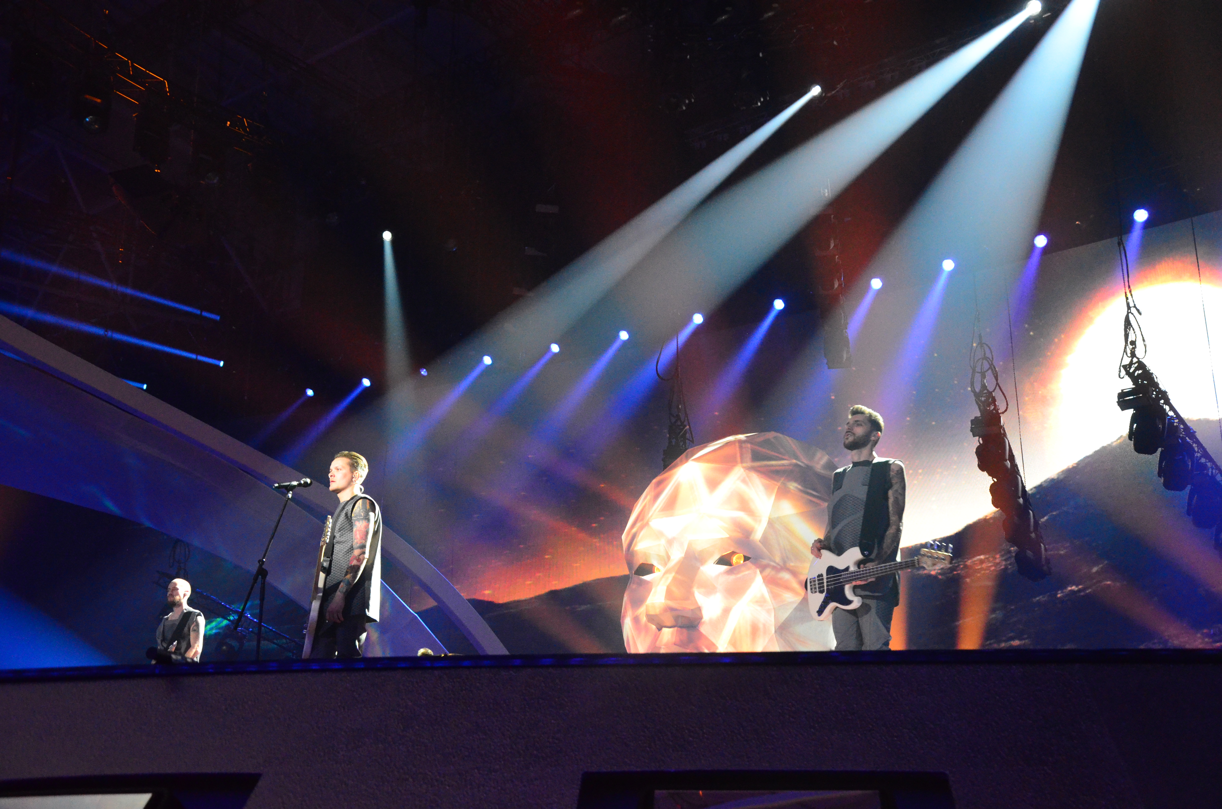 10 травня 2017 року у Києві відбулась генеральна репетиція 2 півфіналу "Євробачення".